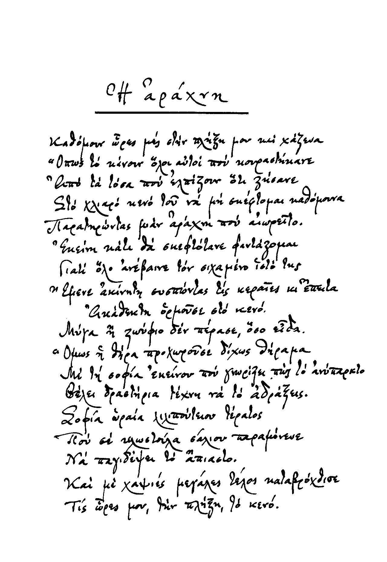 Χειρόγραφο του ποιητή Αντώνη Φωστιέρη